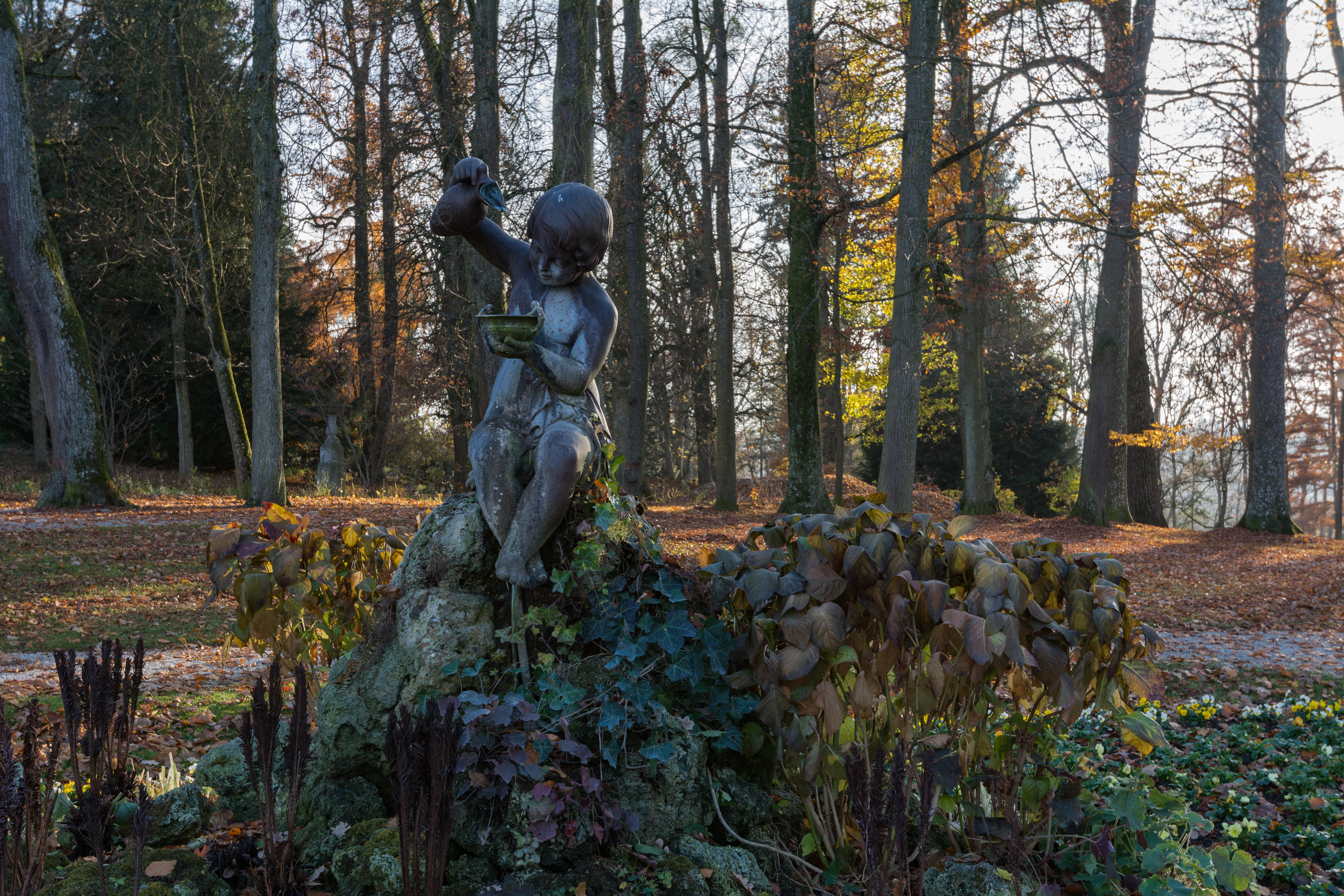 Der Brunnen mit der gußeisernen Figur des Brunnenweibchens wurde 1862 im Kurpark von Bad Hall aufgestellt. Es ist nicht bekannt, wer diese Figur geschaffen hat.